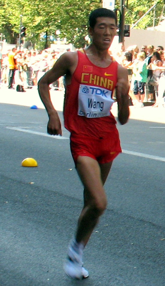 Wang Hao, 15.08.2009